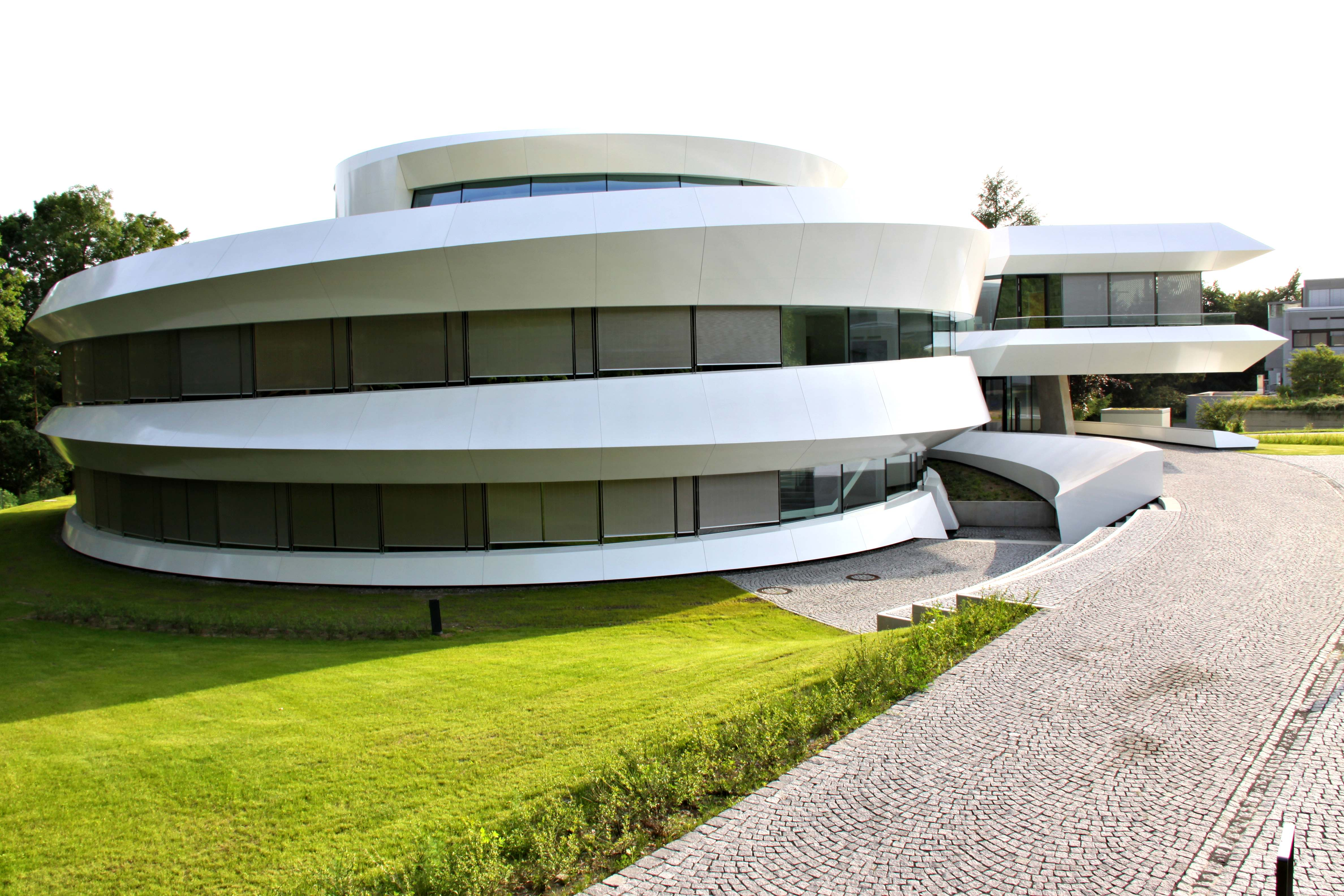 Haus der Astronomie am Max Planck Institut auf dem Königsstuhl (Heidelberg), Juli 2012.